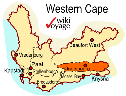 Region Klein Karoo in der Provinz Westkap, Südafrika